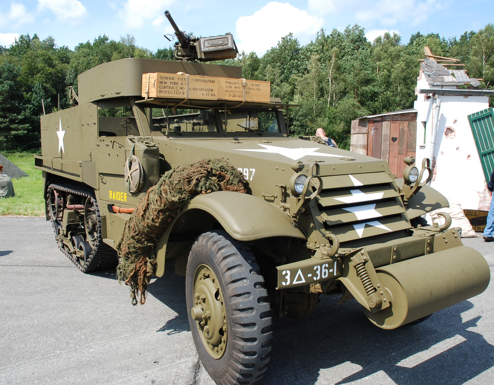 M3 halftrack op het vliegveld van Ursel, België